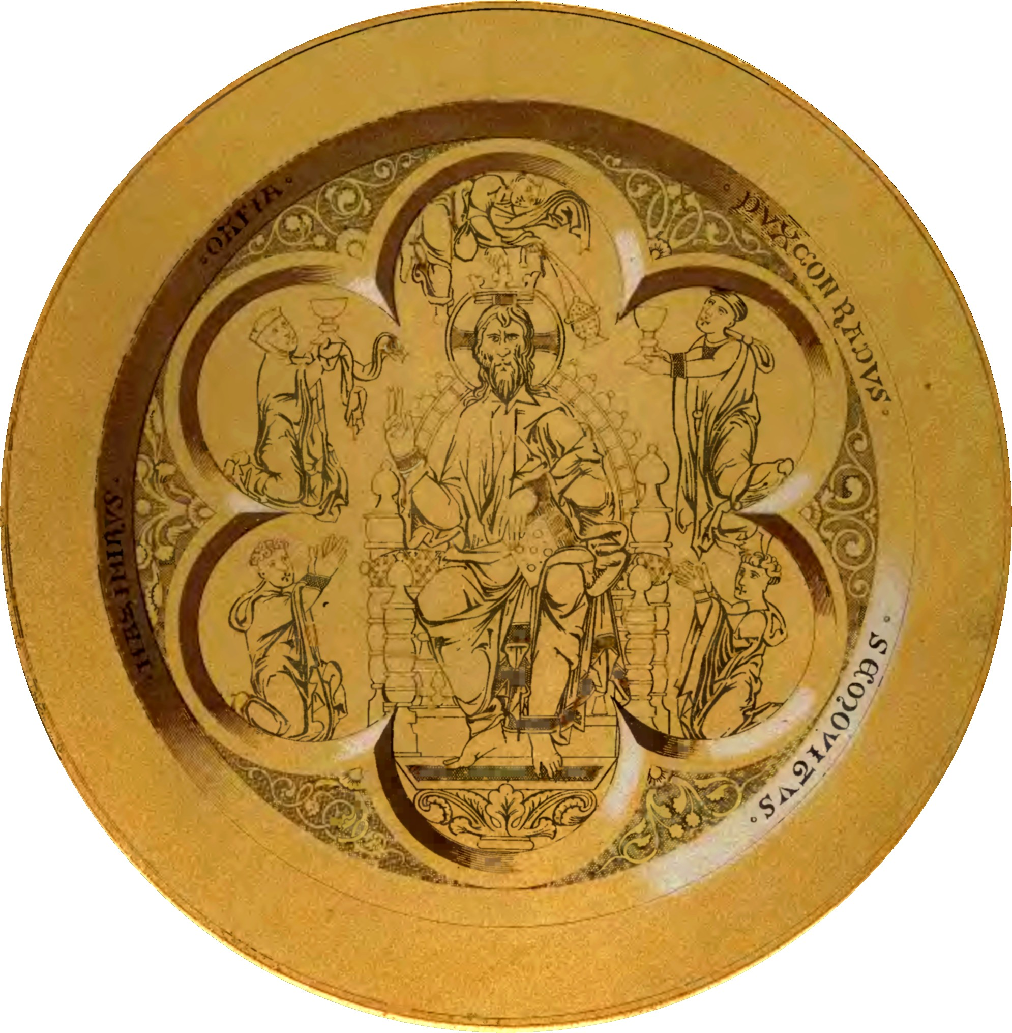 engraving